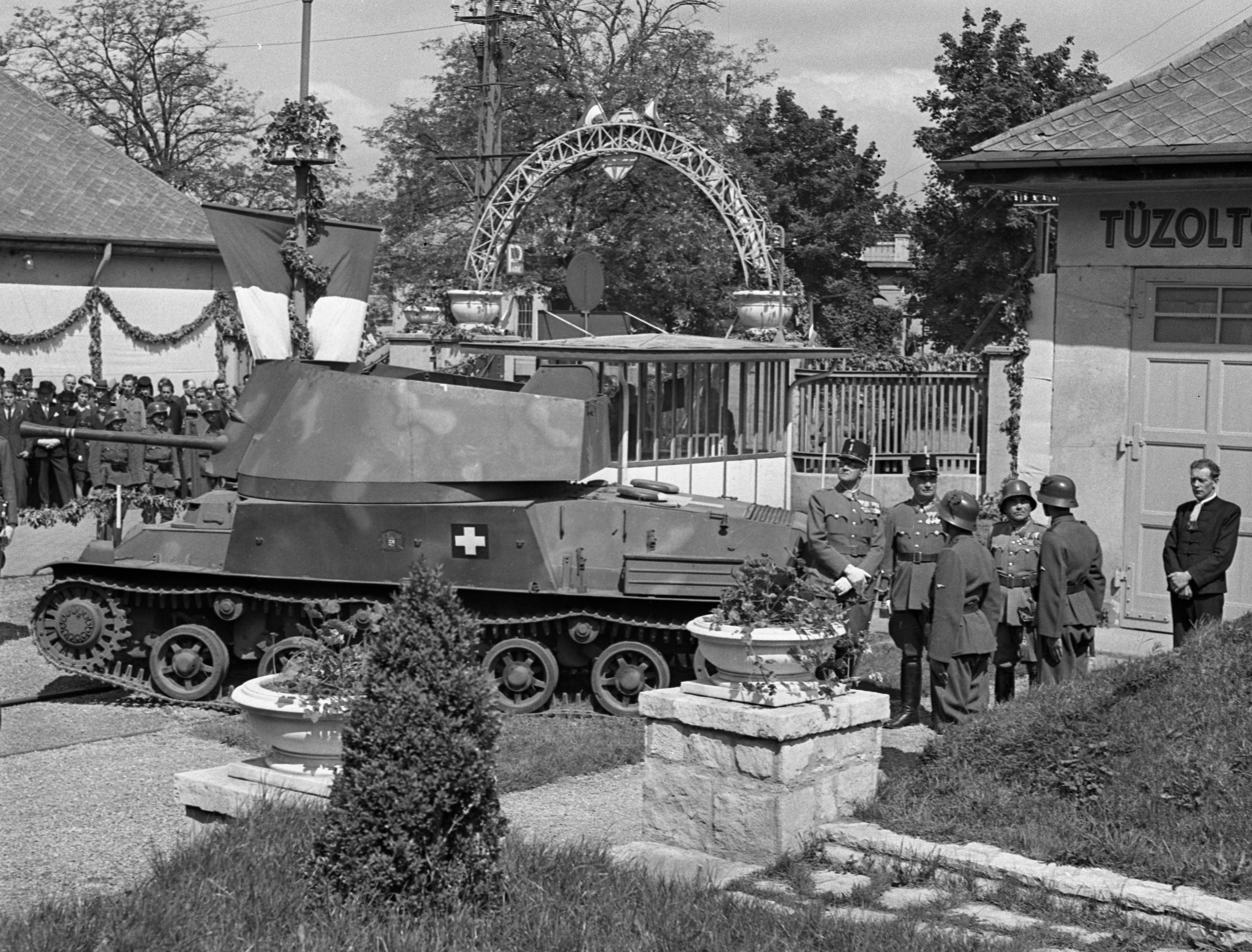 Mátyásföld, Újszász utca 41-43. Magyar Királyi Honvéd gépkocsiszertár díszudvara, haditechnikai bemutató. Location: Hungary, Budapest XVI. Tags: combat vehicle, Hungarian brand, soldier, Budapest Title: Mátyásföld, Újszász utca 41-43. Magyar Királyi Honvéd gépkocsiszertár díszudvara, haditechnikai bemutató.